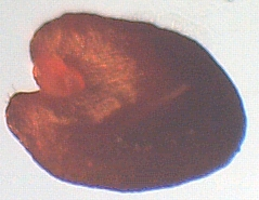 Gemma Drosera pygmaea 40x